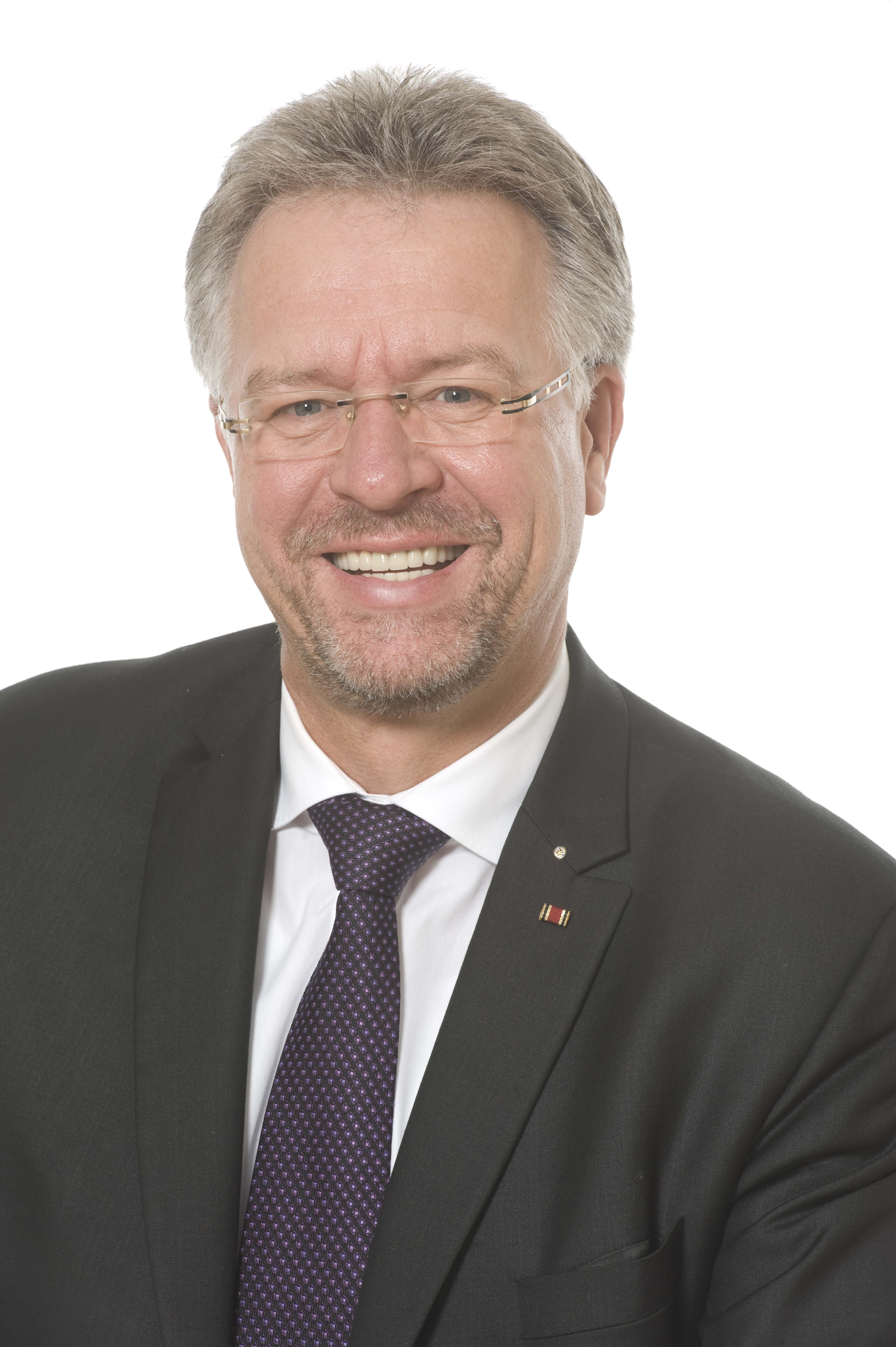 Dieter Welsink, Kanuslalom-Weltmeister im Zweier-Kanadier (1979) und Geschäftsführender Gesellschafter der medicoreha Welsink Unternehmensgruppe.